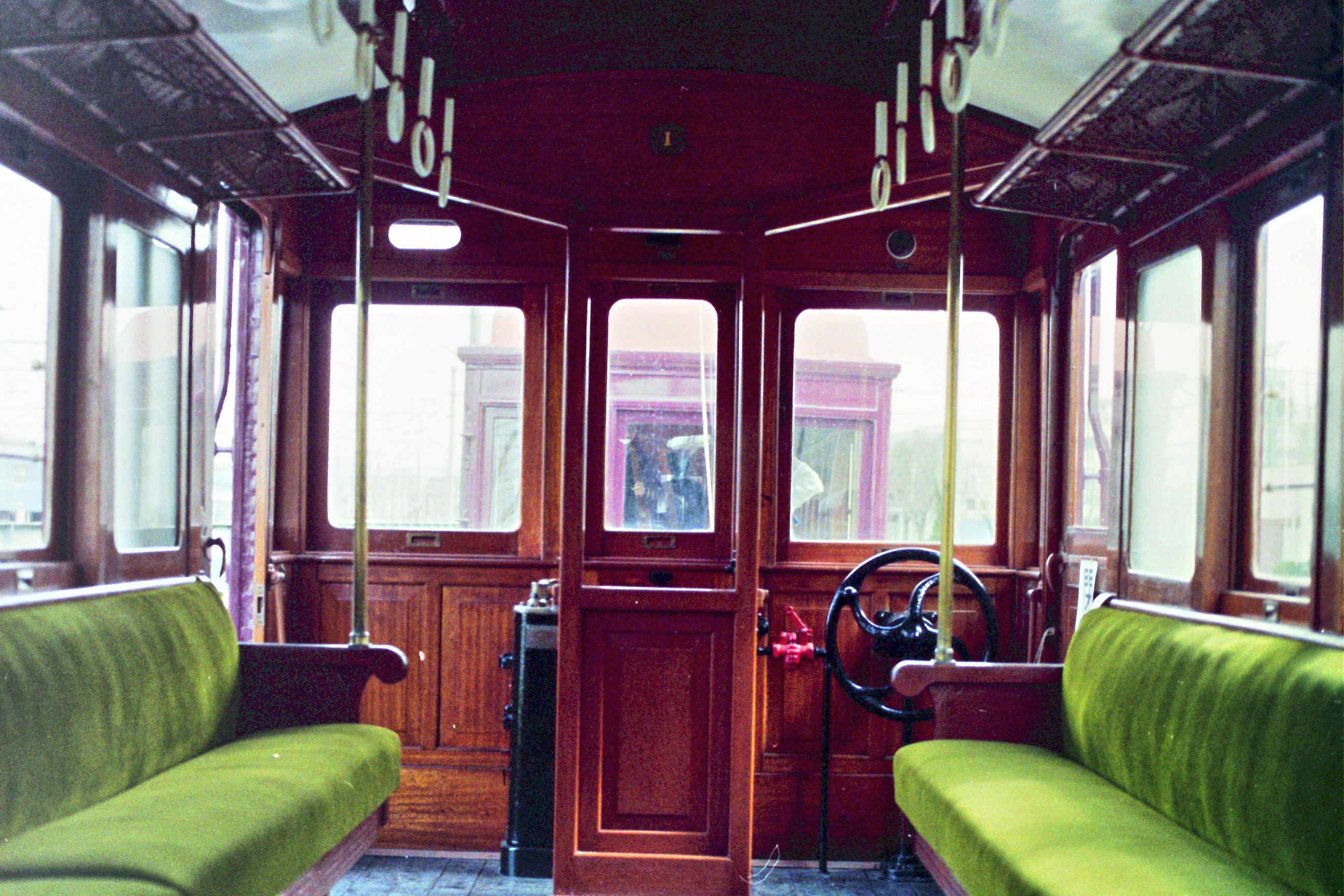 阪急1形保存車車内